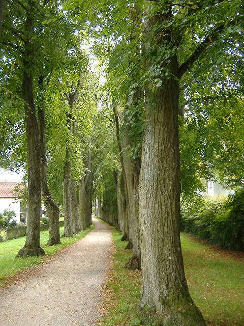 Eine Straße mit vielen Bäumen, ja das ist eine Allee, hier eine in Nördlingen.